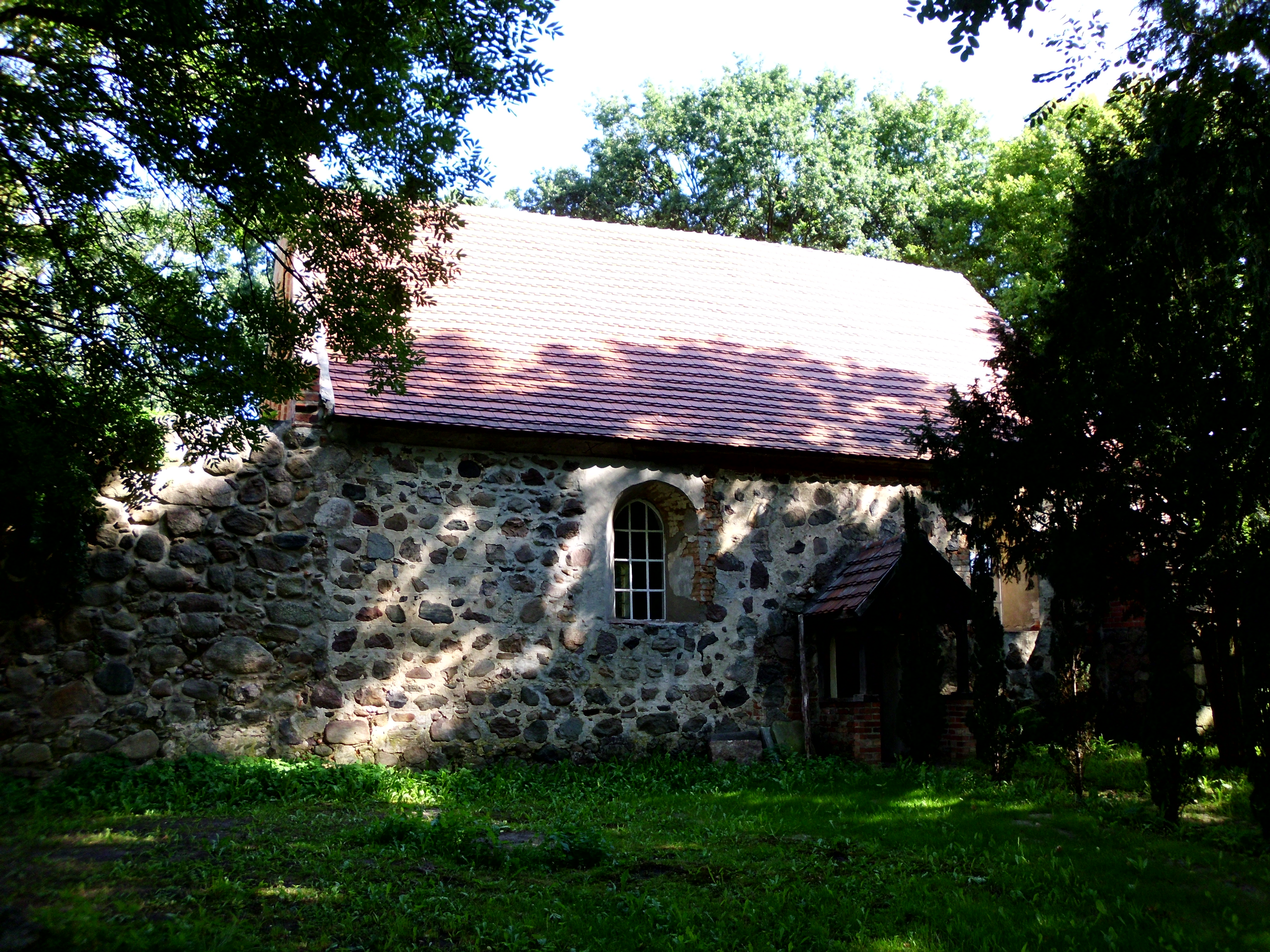 Dorfkirche Rosenhagen